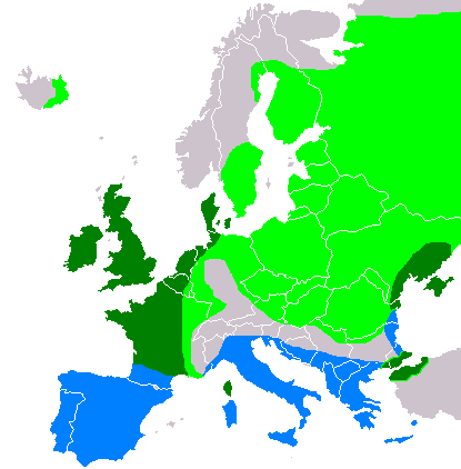 my pic